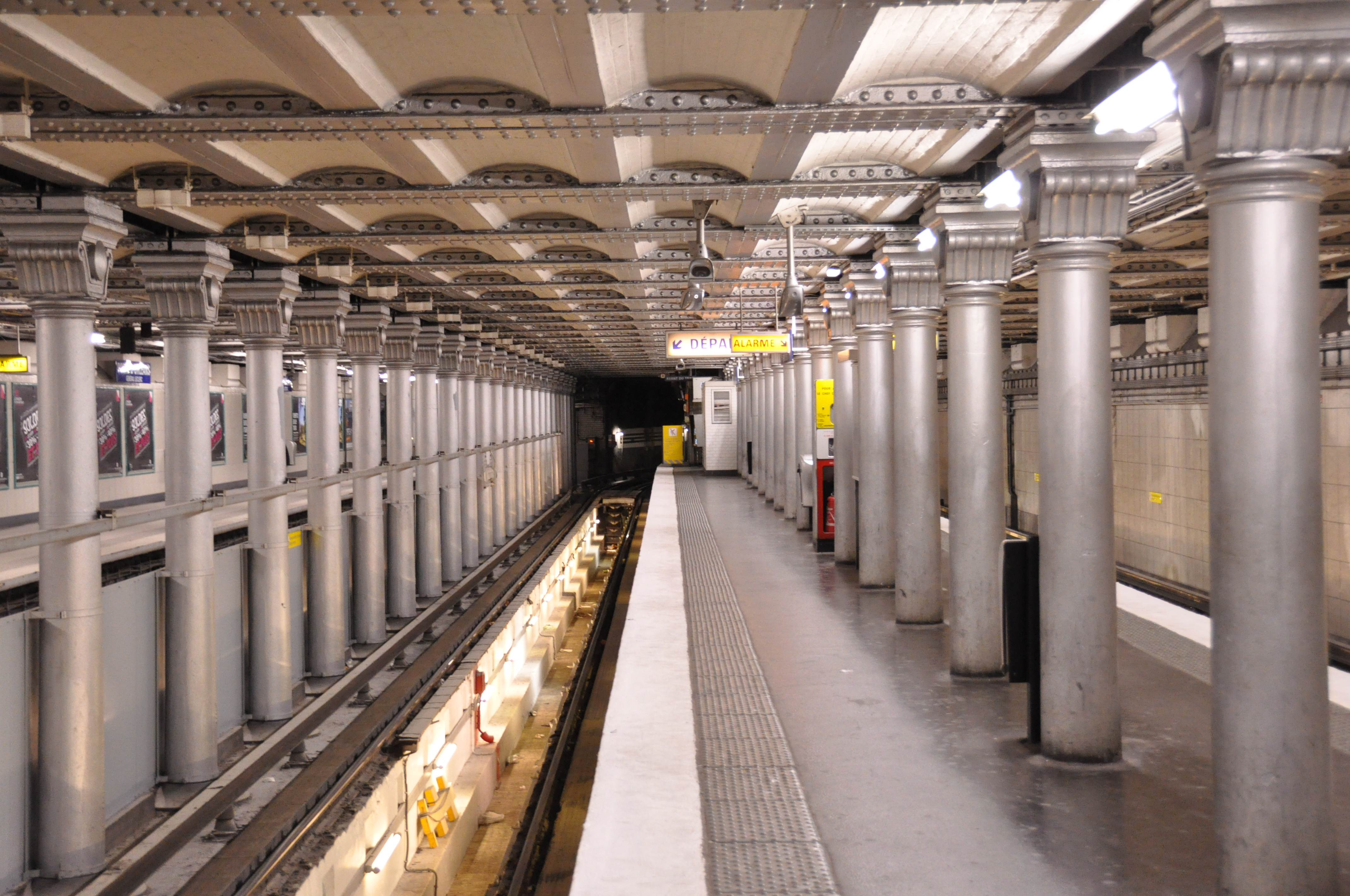 Vue des quais de la station Porte d'Orléans sur la ligne 4 du métro de Paris.